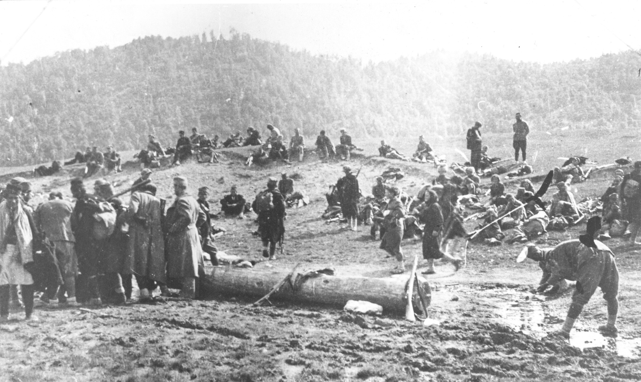 Srpskohrvatski / српскохрватски: Jedinice prve proleterske brigade na kratkom predahu kod Vučeva tokom bitke na Sutjesci.